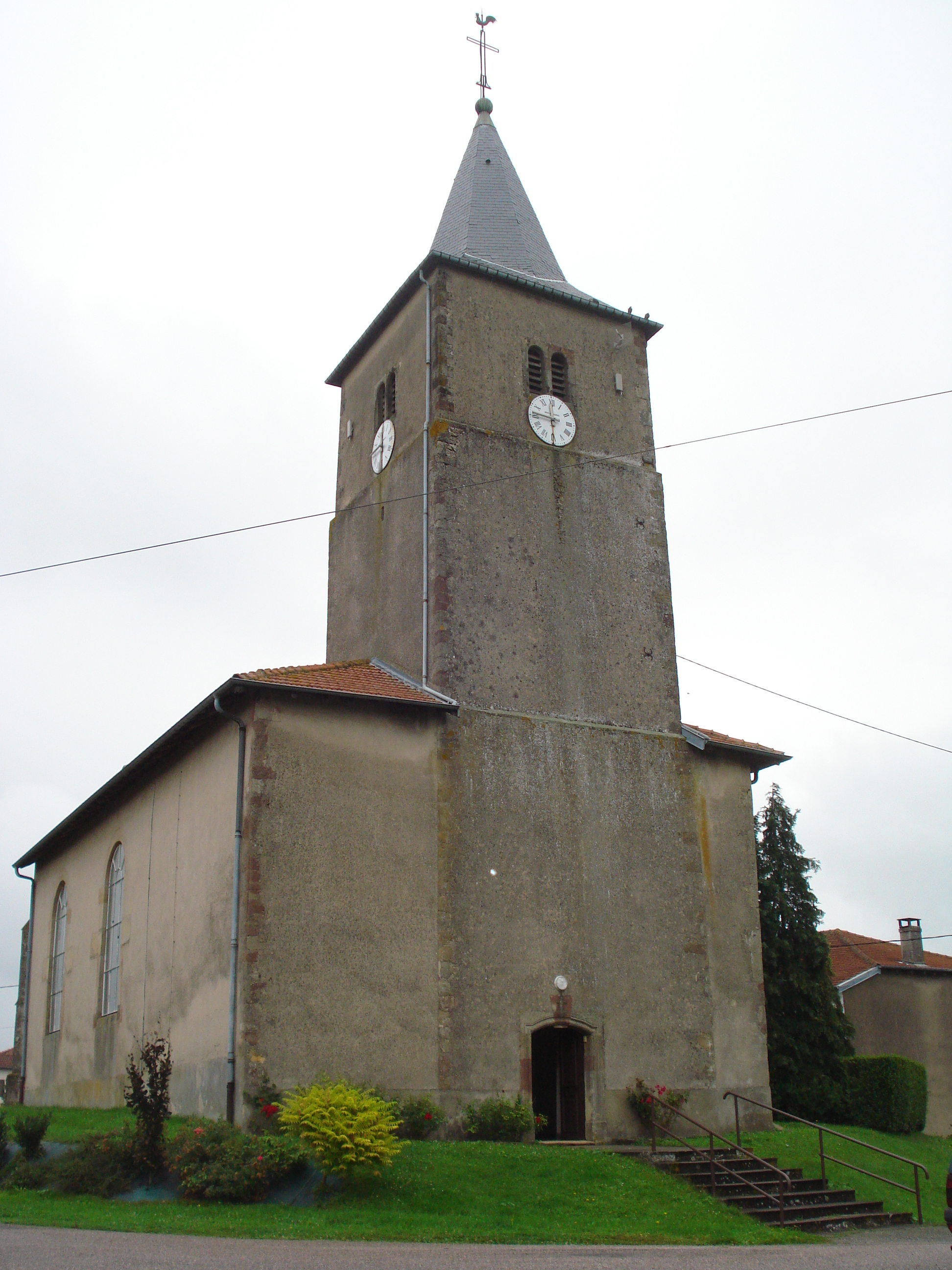 Eglise de Manonviller : tour XVIIIe, chœur XVIe, nef XVIIIe remaniée ; gisant XVIe.